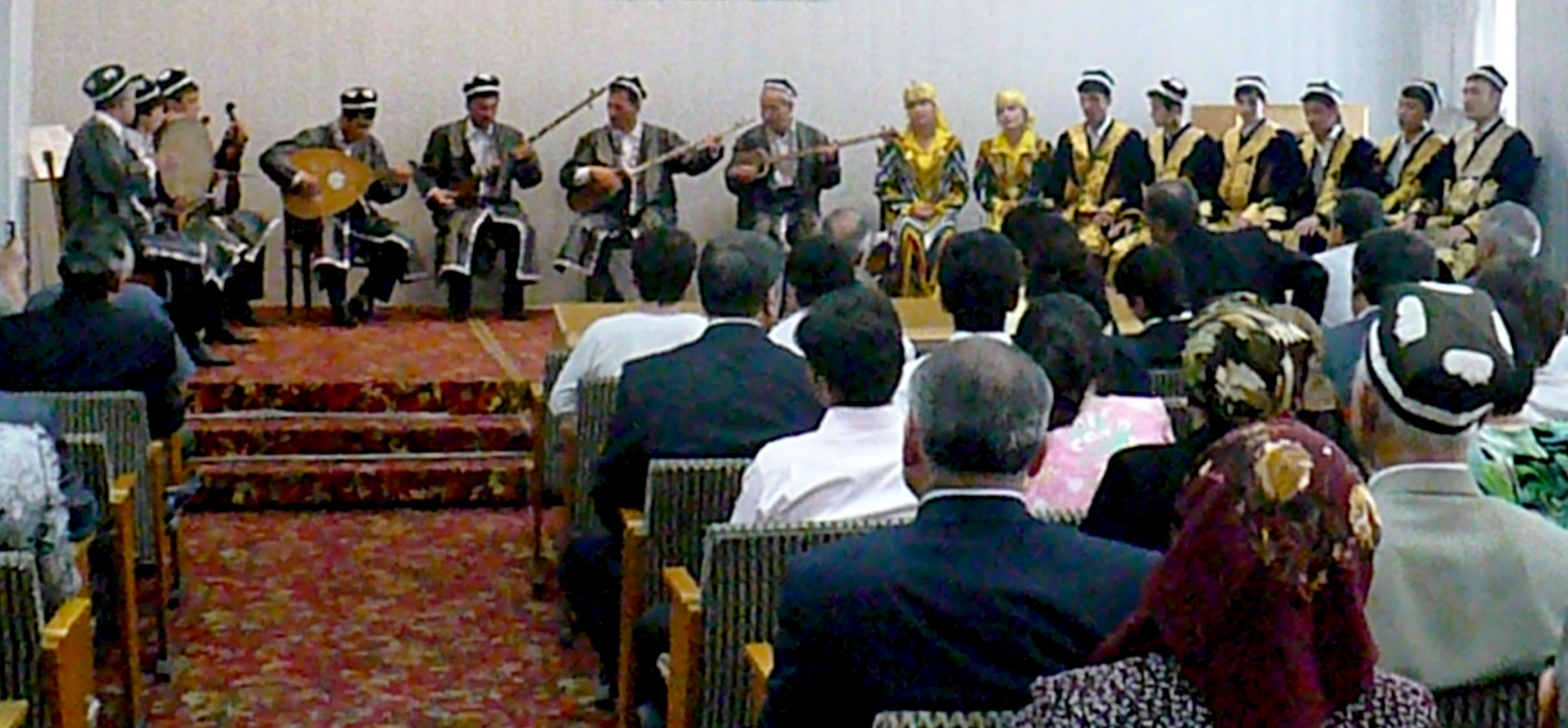 Ансамбль народных исполнителей (Таджикистан) Тоҷикӣ: Ансамбли сарояндагони "Шашмақом" факултети санъати ДДХ ба номи Б. Ғафуров, ш.Хуҷанд